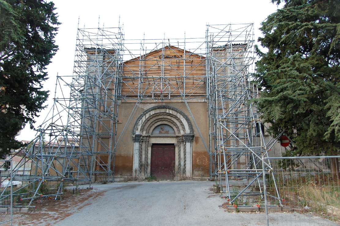 L'Aquila 2011